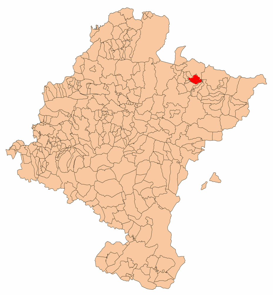 Origen: es::Commons:Image:Navarra - Mapa municipal.svg